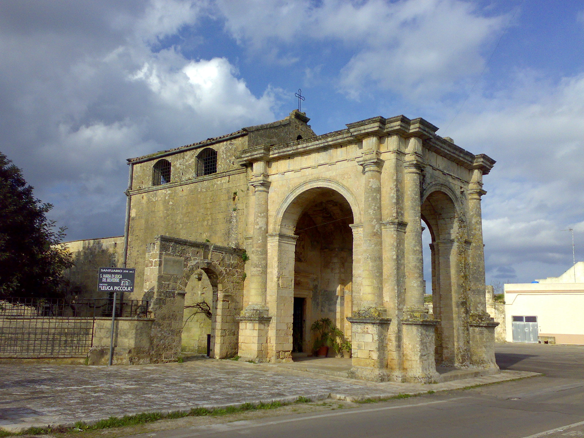 Leuca Piccola Barbarano del Capo